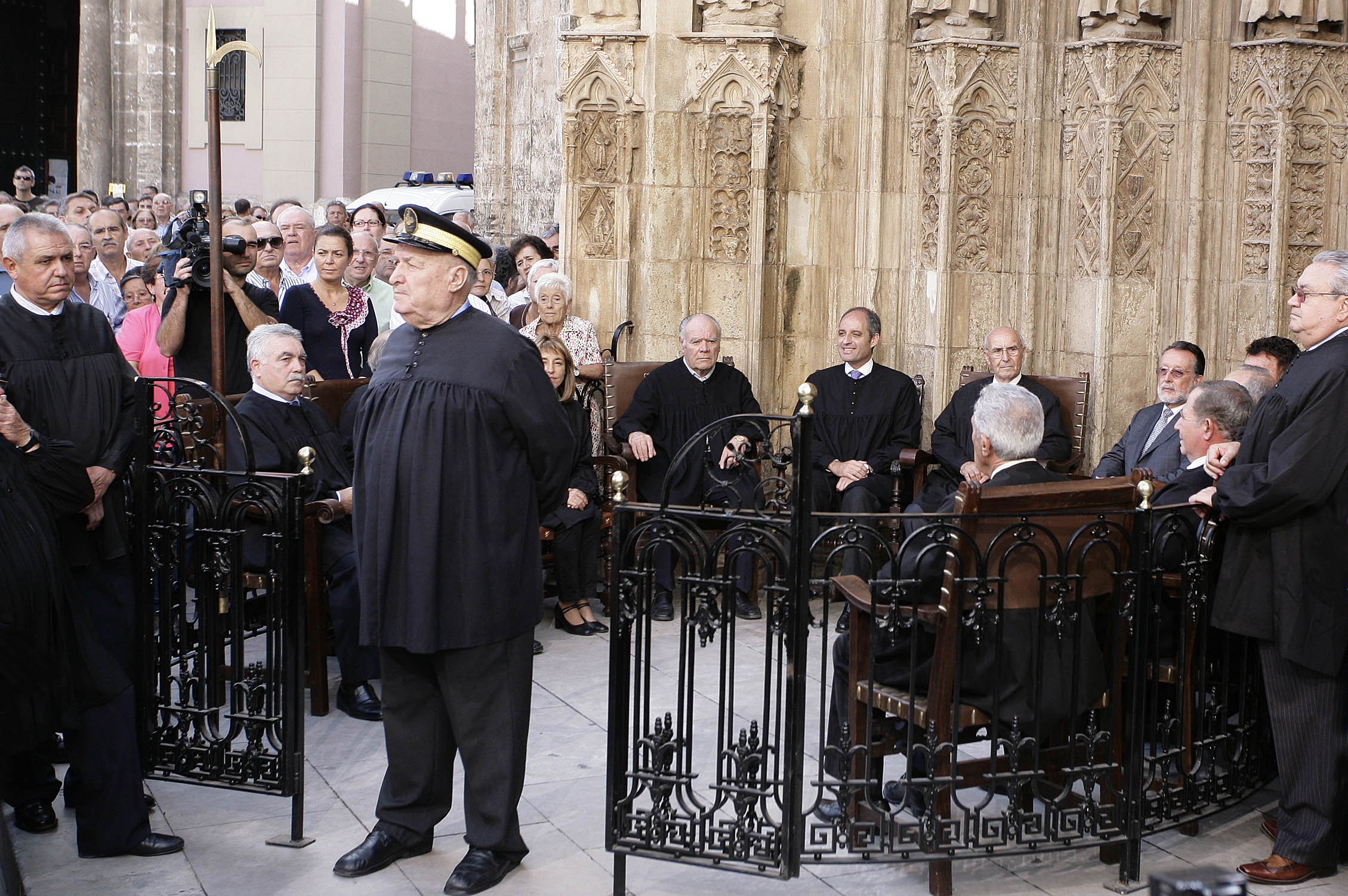 Tribunal de les Aigues amb Camps